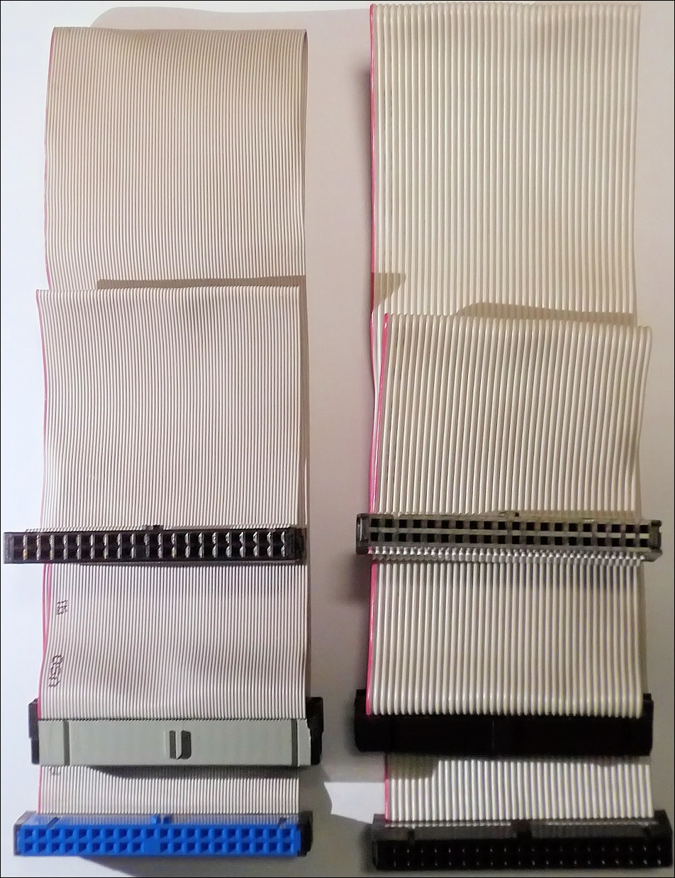 Flatcable 40 en 80 aderig